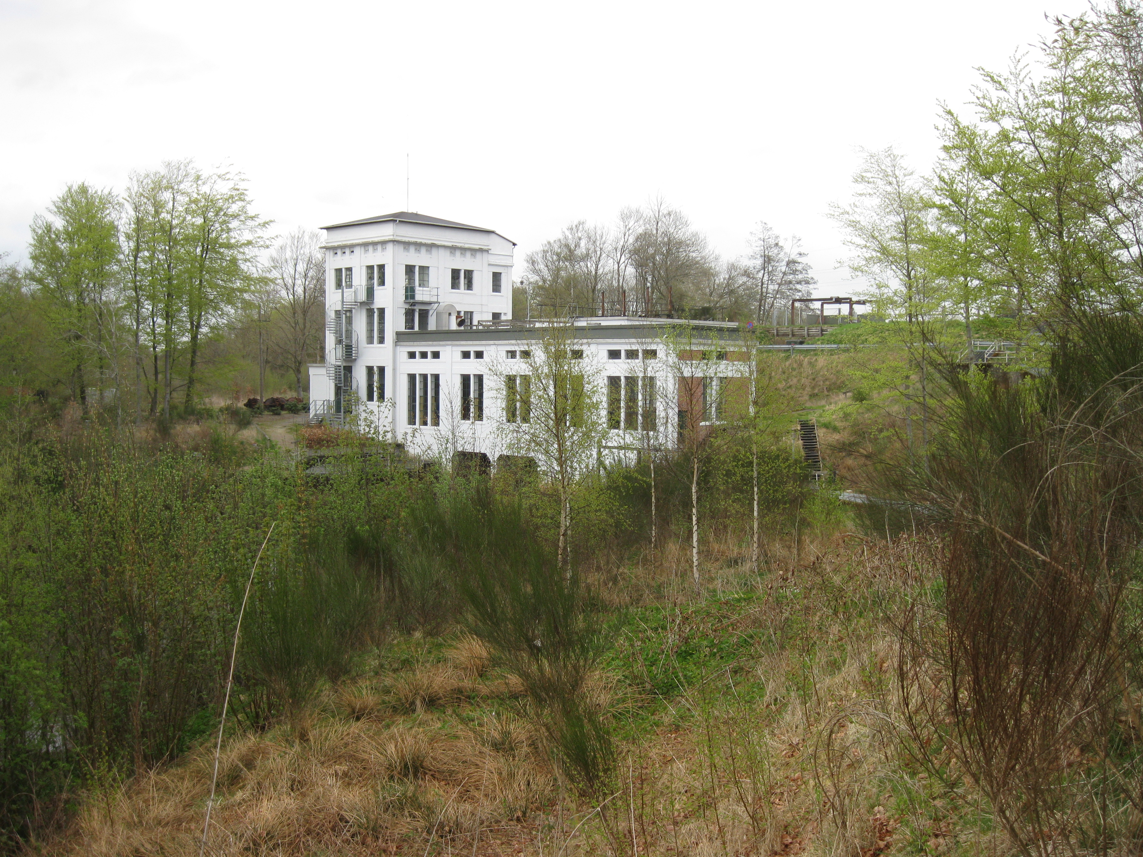 Karlsgårdeværket